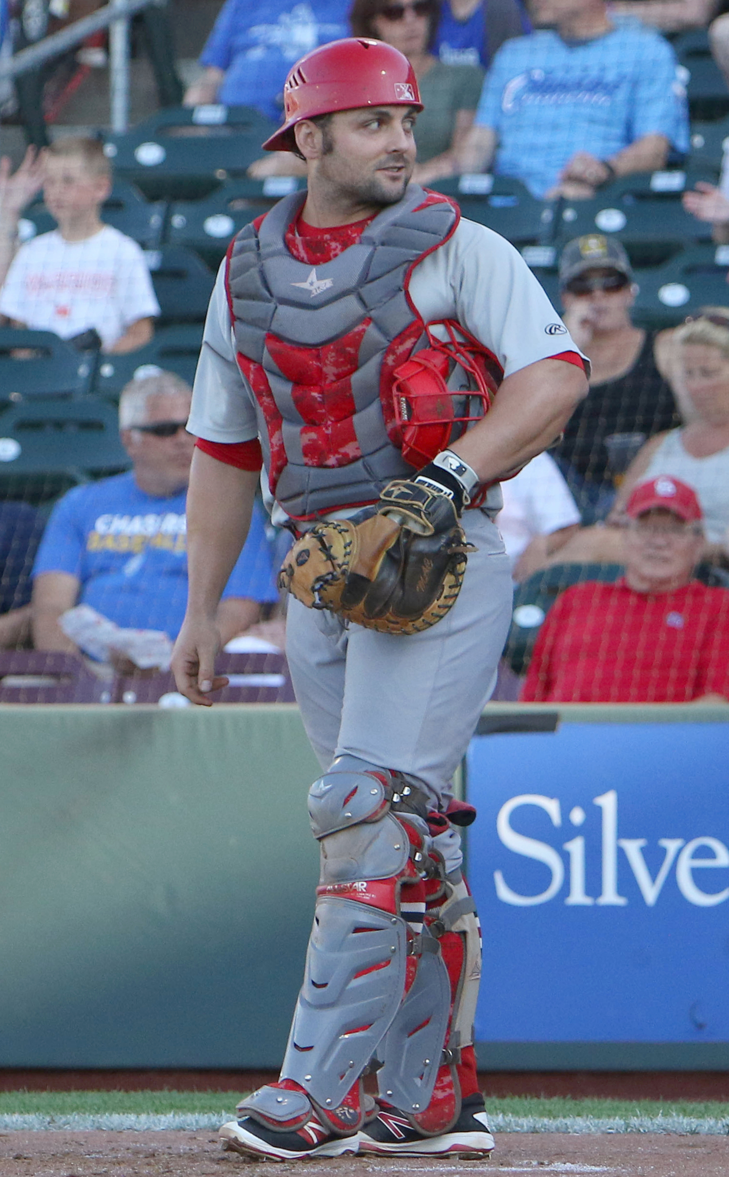 Michael McKenry